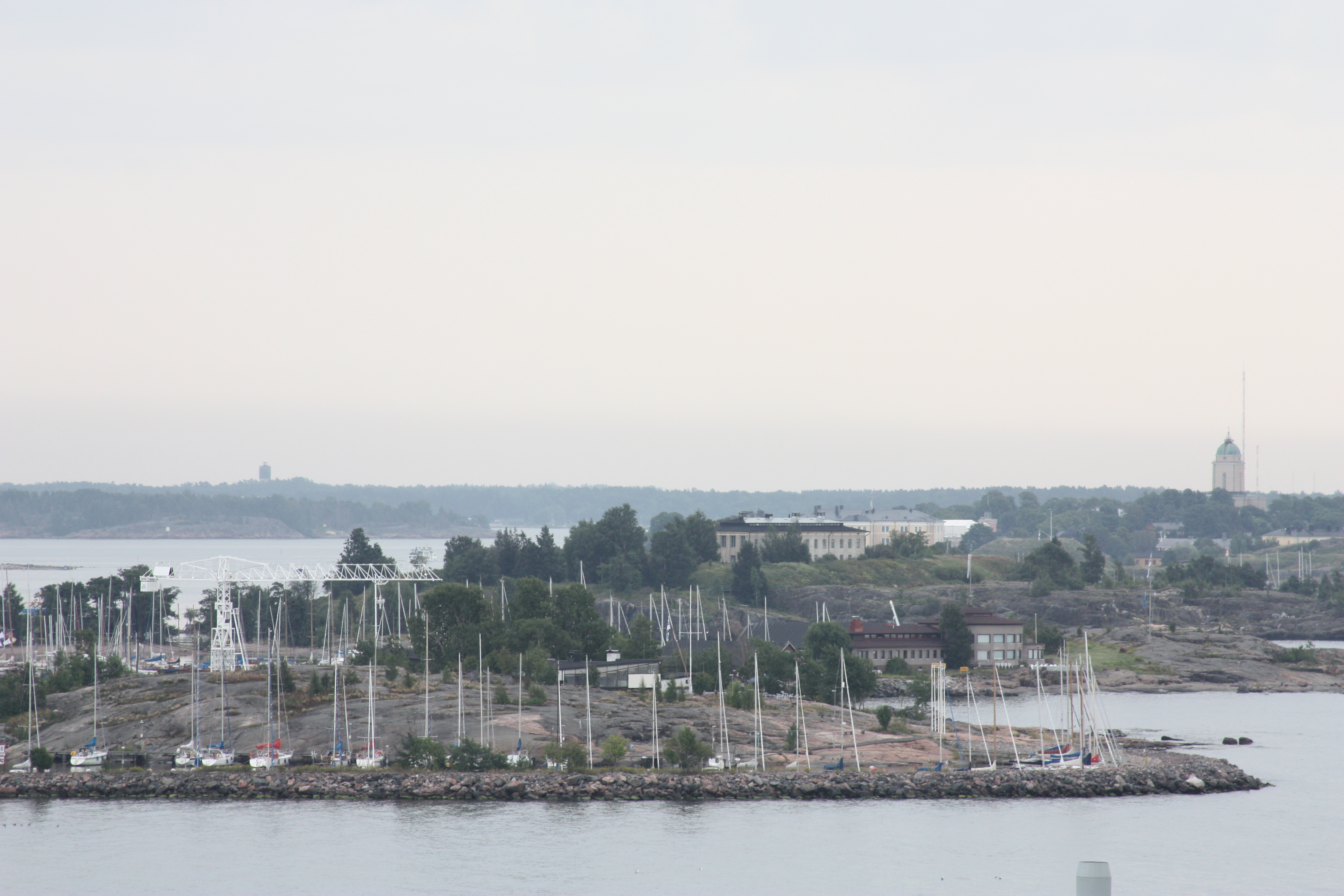 tourist pictures of Helsinki